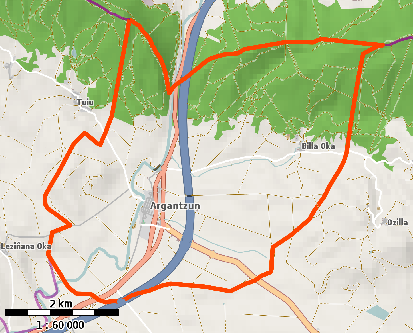 Argantzun udalerriaren mapa OSM 2016